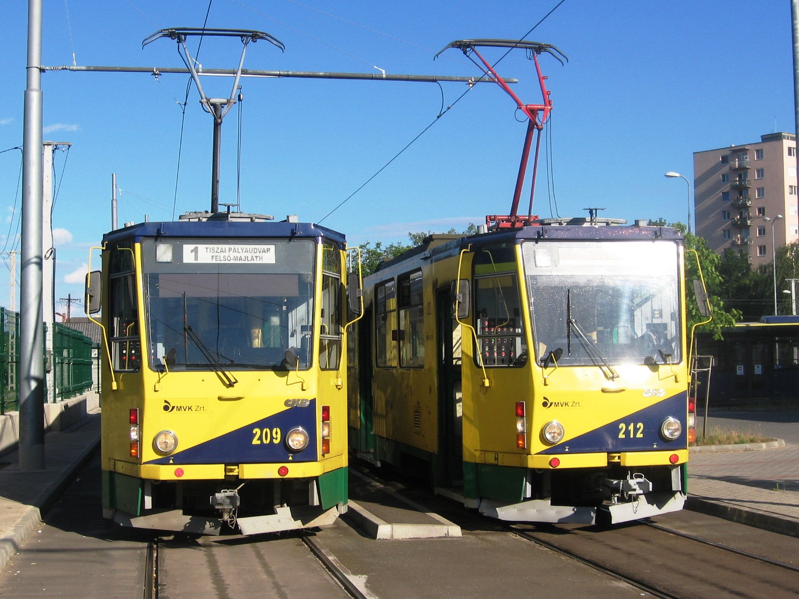 2 Tátra villamos Felső-Majláthon.